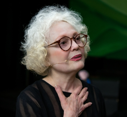 דליה פרידלנד פורטרט 2013